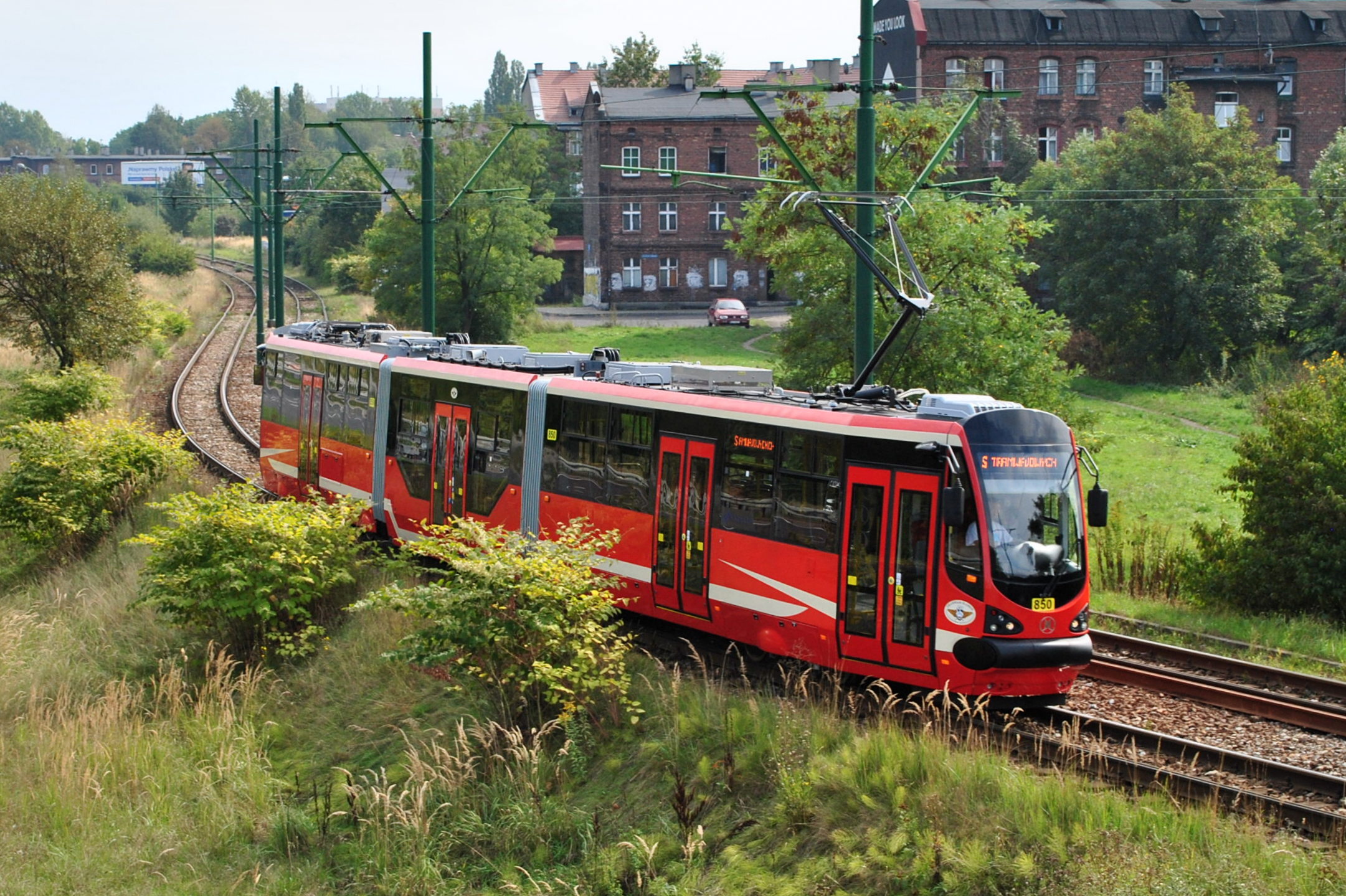 Moderus Beta MF 16 AC BD w pobliżu przystanku Załęże Wiśniowa (przejazd specjalny podczas parady z okazji Dnia Otwartego ZUR)